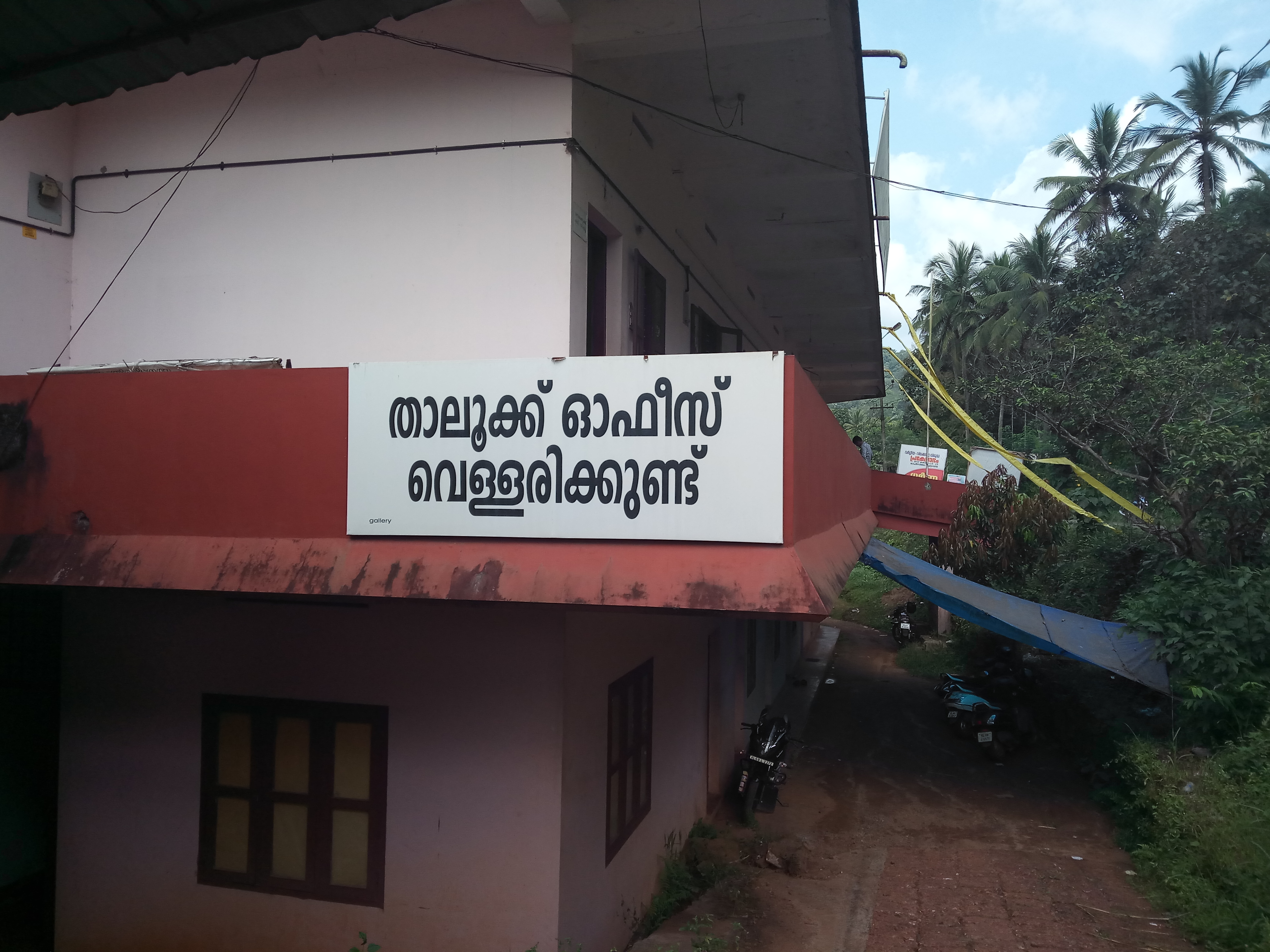 Vellarikundu Taluk Office